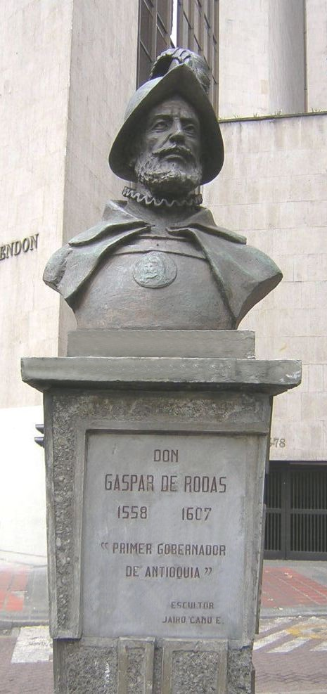 Busto de Gaspar de Rodas, ubicado en la Av. la Playa, Medellín, Colombia